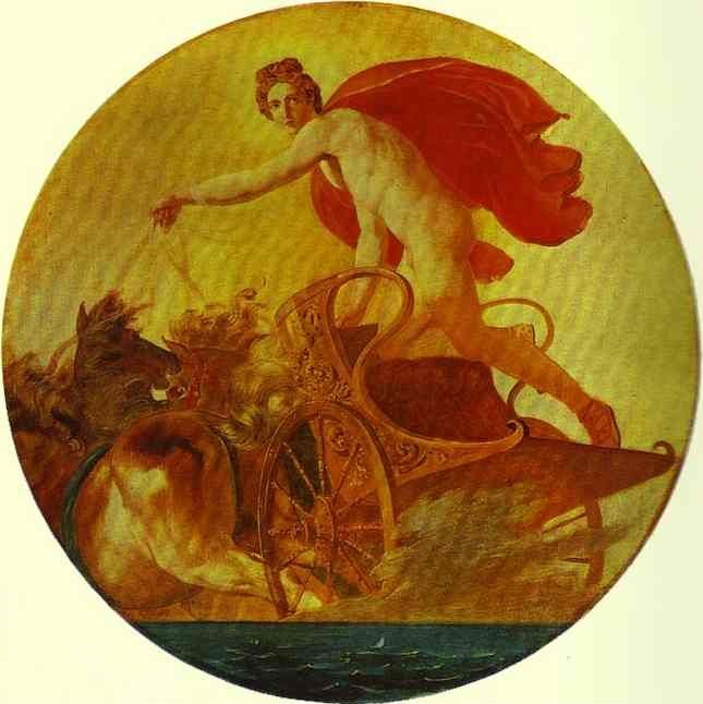 Febe sul suo carro